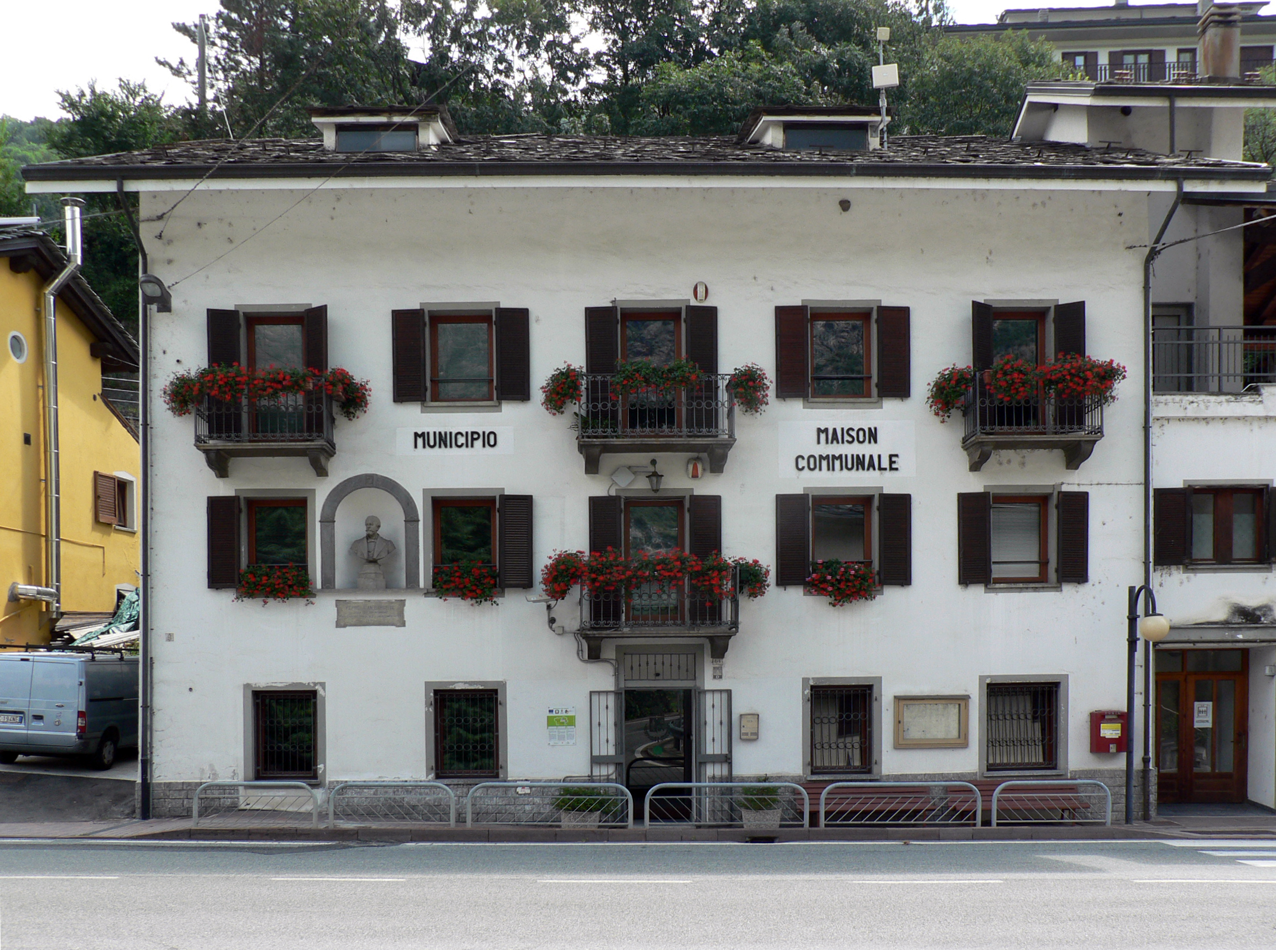 municipio di Montjovet, Valle d'Aosta, Italia.